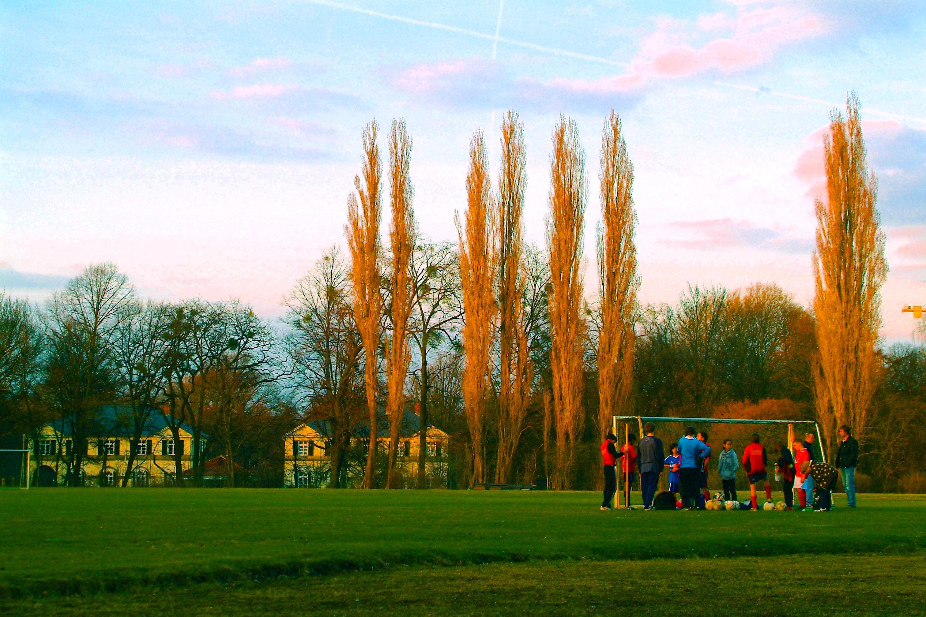 Spätwinter-Abendstimmung während einer betreuten ko-edukativen Fußball-Übung der Jugend auf dem Gelände des Vereins für Leibesübungen von 1848 Hannover. Im Hintergrund die Cavalierhäuser im Welfengarten.